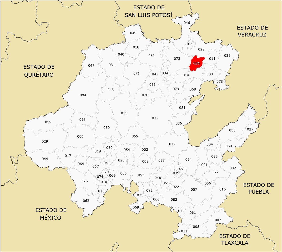 Municipios de Hidalgo